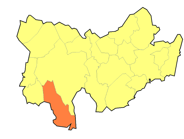 Hranice Mouřínov (Vyškov-(Bučovice)- czech republic)